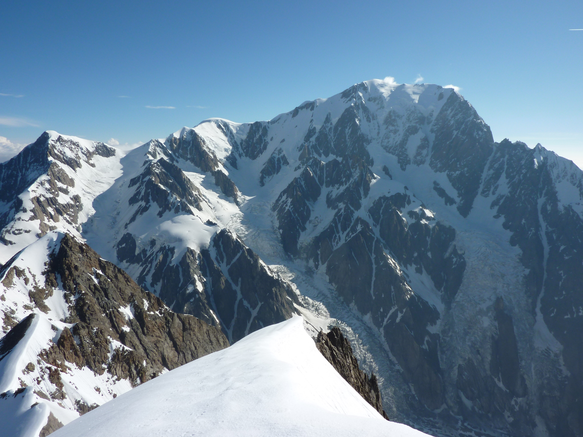 Vue sur le Mont Blanc depuis l'Aiguille Nord de Tré la Tête